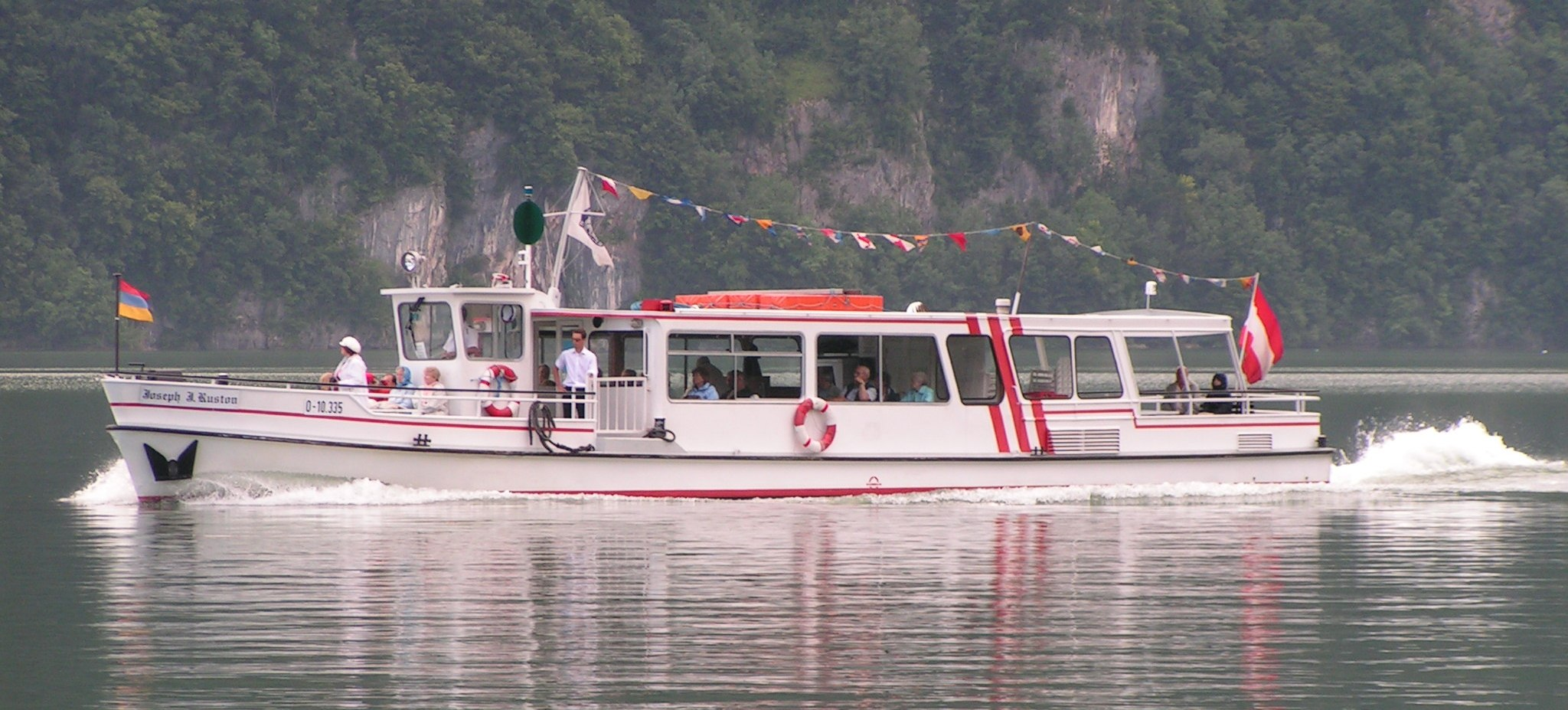 Fahrgastschiff Joseph J. Ruston auf dem Traunsee bei Traunkirchen; gebaut 1965 auf der Luxwerft in Mondorf; Baunummer 019; aktueller Name: La Belle